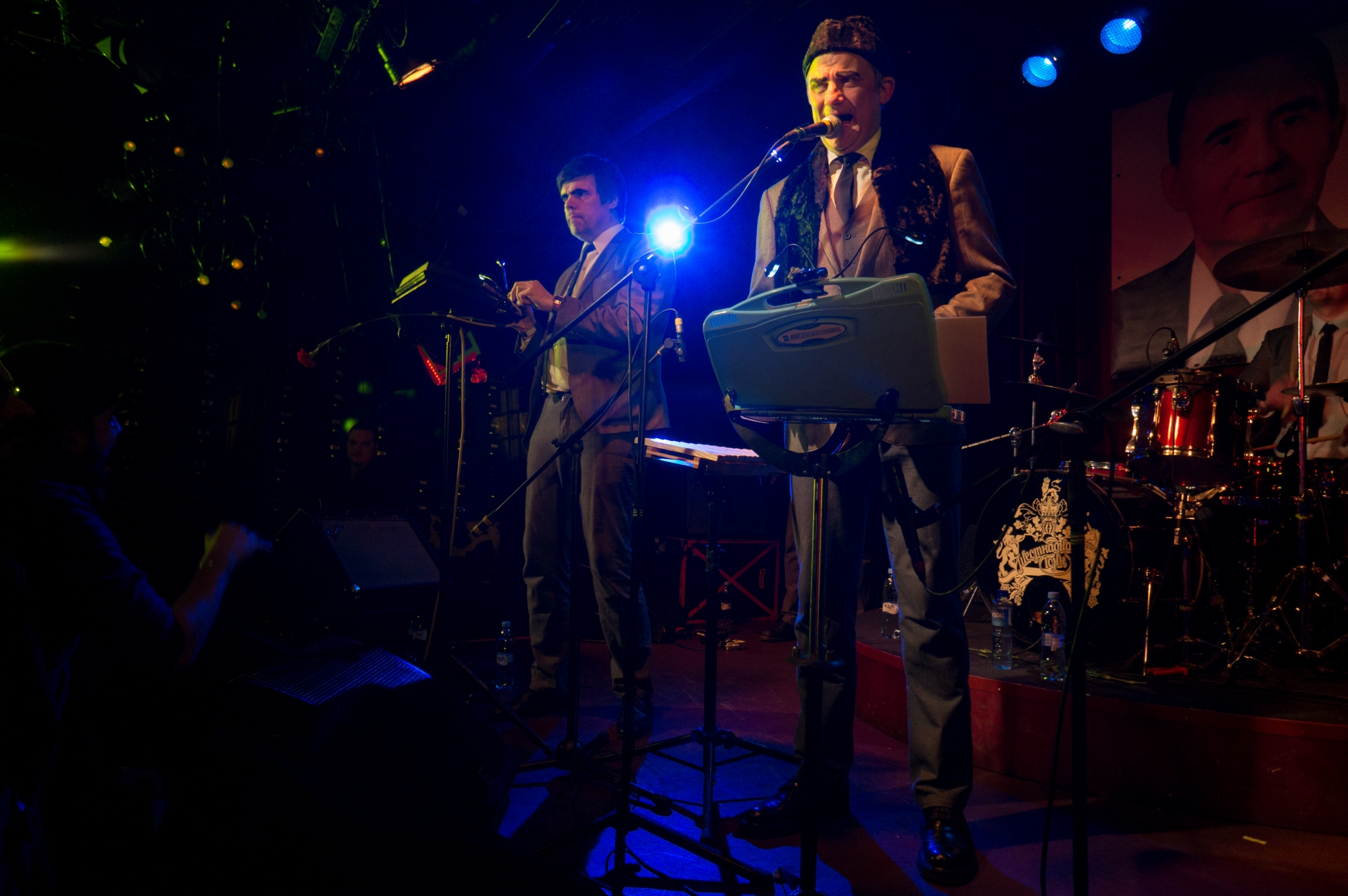 Концерт группы «Громыка» в Москве. Максим Кошелев и Павел Фролов.